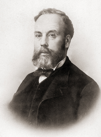 Francesc Brosa i Casanobas (1834-1899). Retrato de Pau Audouard Déglaire.